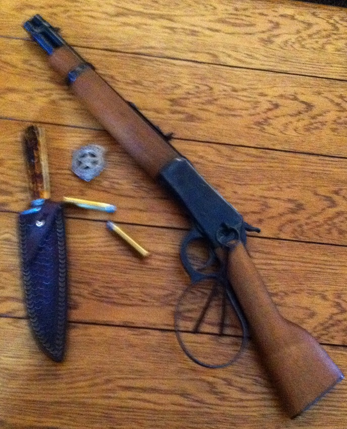 Rossi Ranch Hand